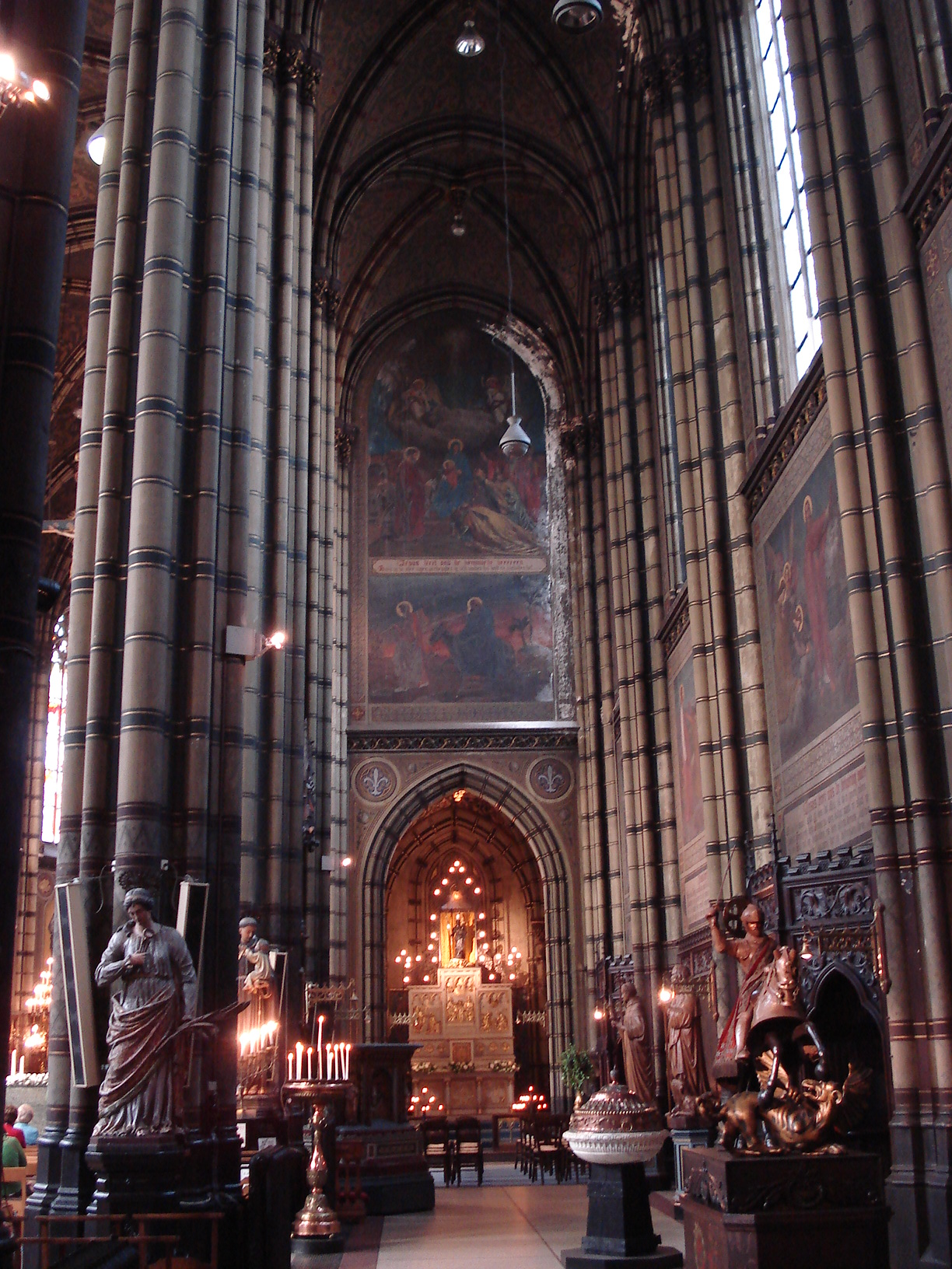 Antwerpen, Sint-Joriskerk, rechter zijbeuk.